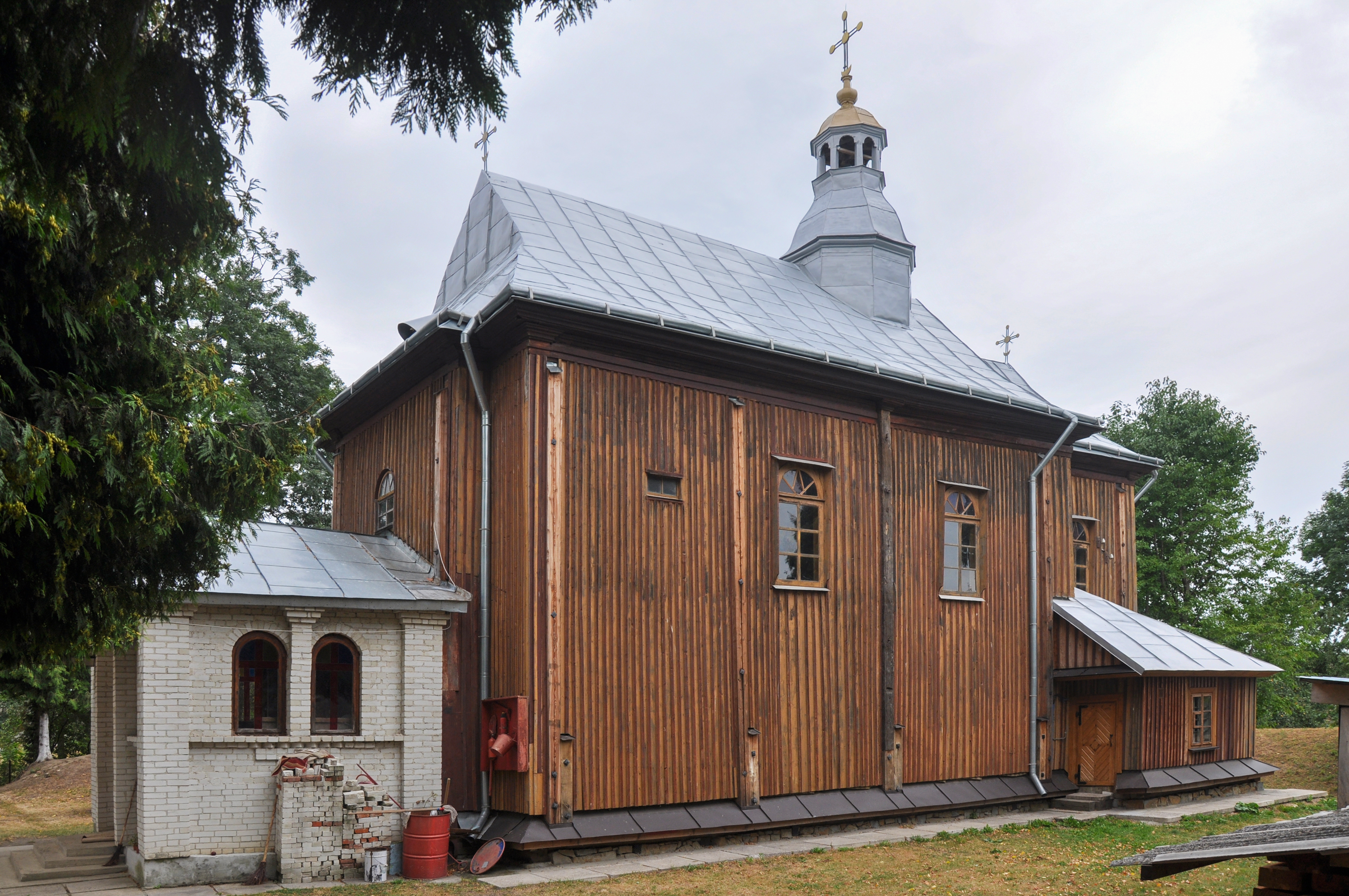 Церква Св.Михаїла (дер.), с.Дмитровичі